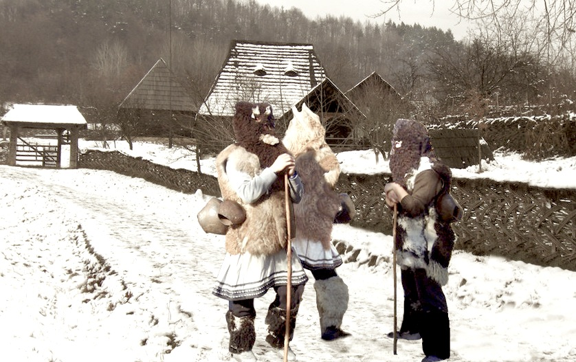 Rugăciori și legători în Maramureș, colindând cu "urșii"